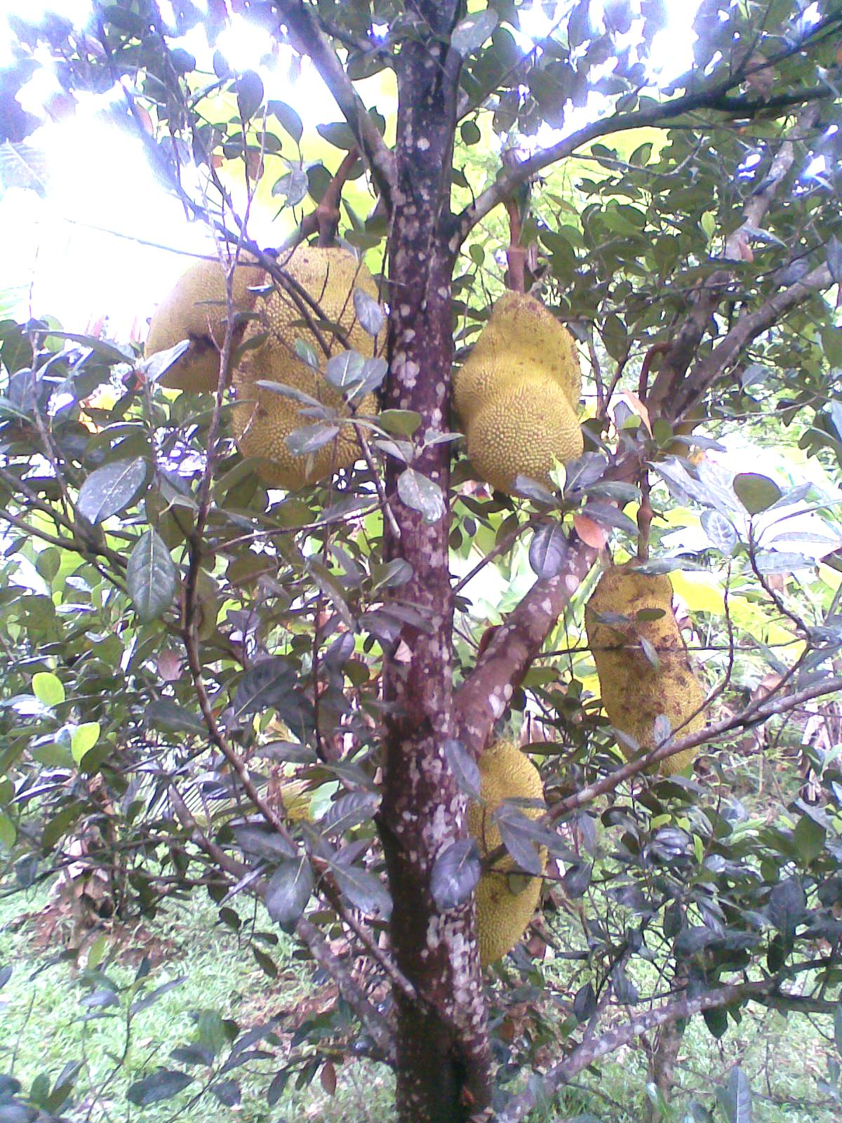 പ്ലാവ്